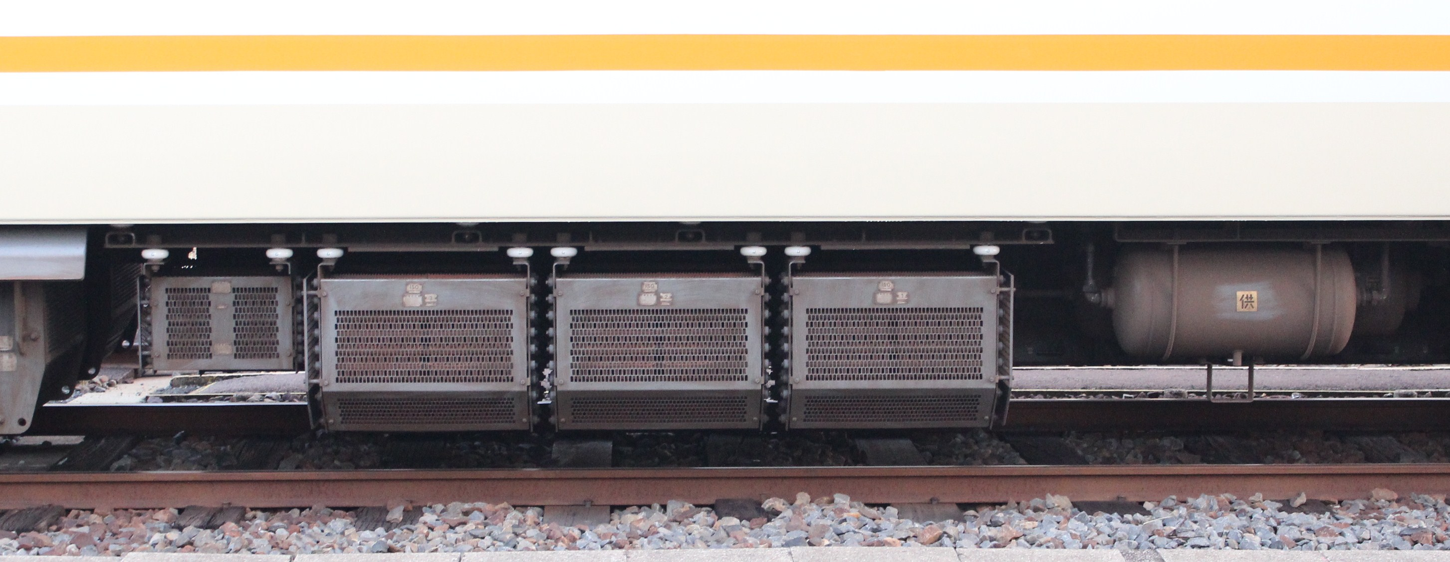 21020系主抵抗器